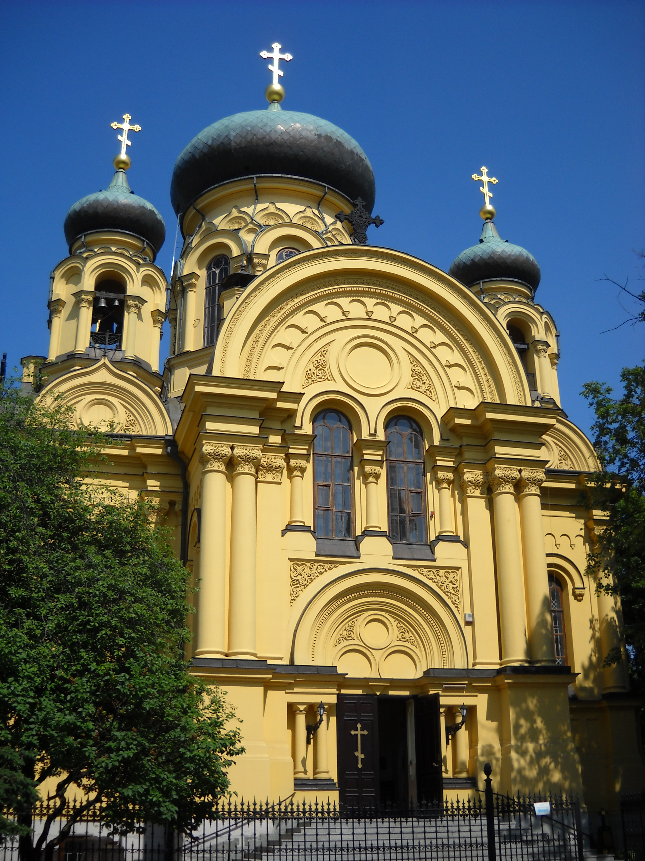 Sobór św. Marii Magdaleny w Warszawie, fasada zachodnia